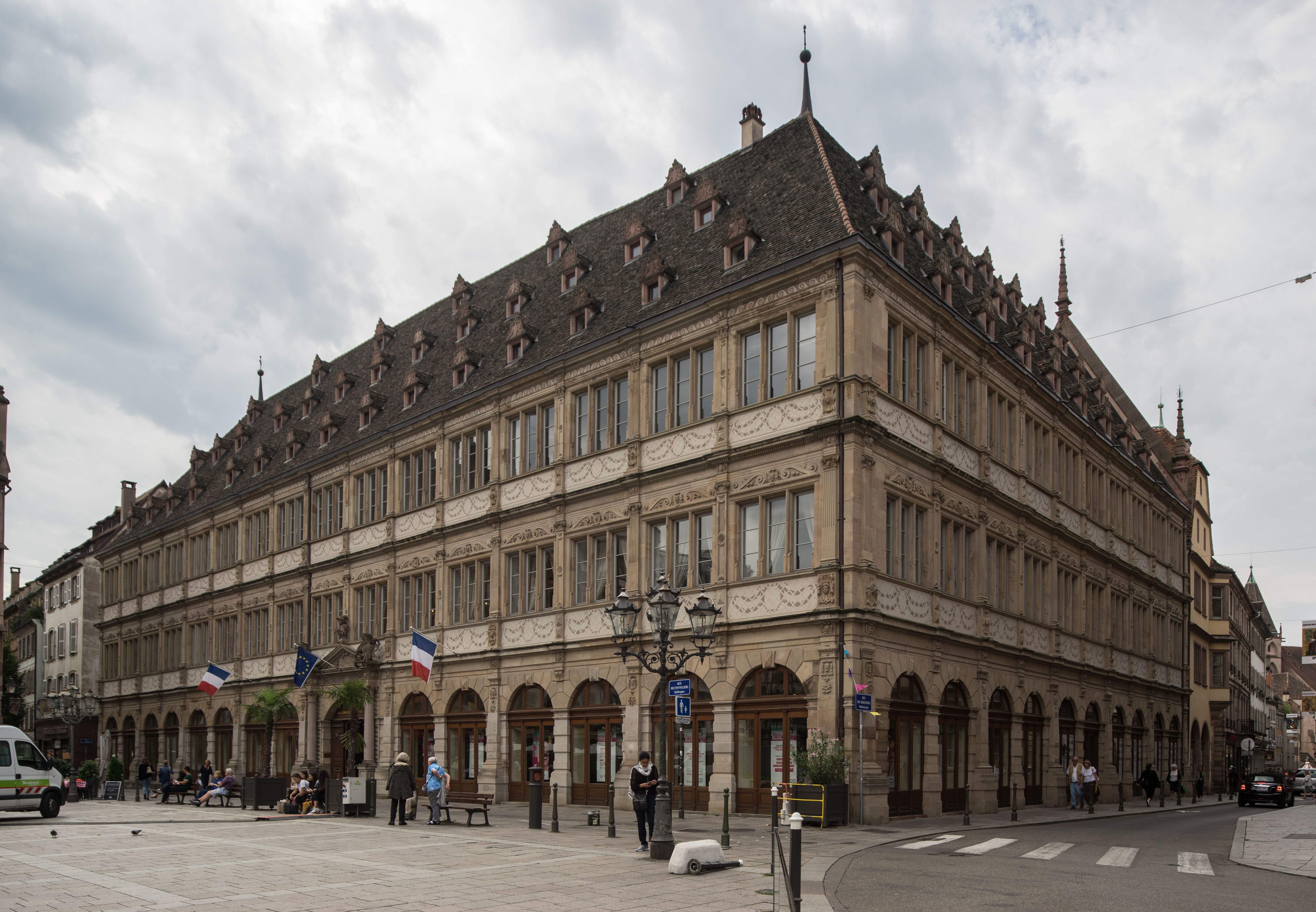 Camára de Comercio e Industria de Estrasburgo .